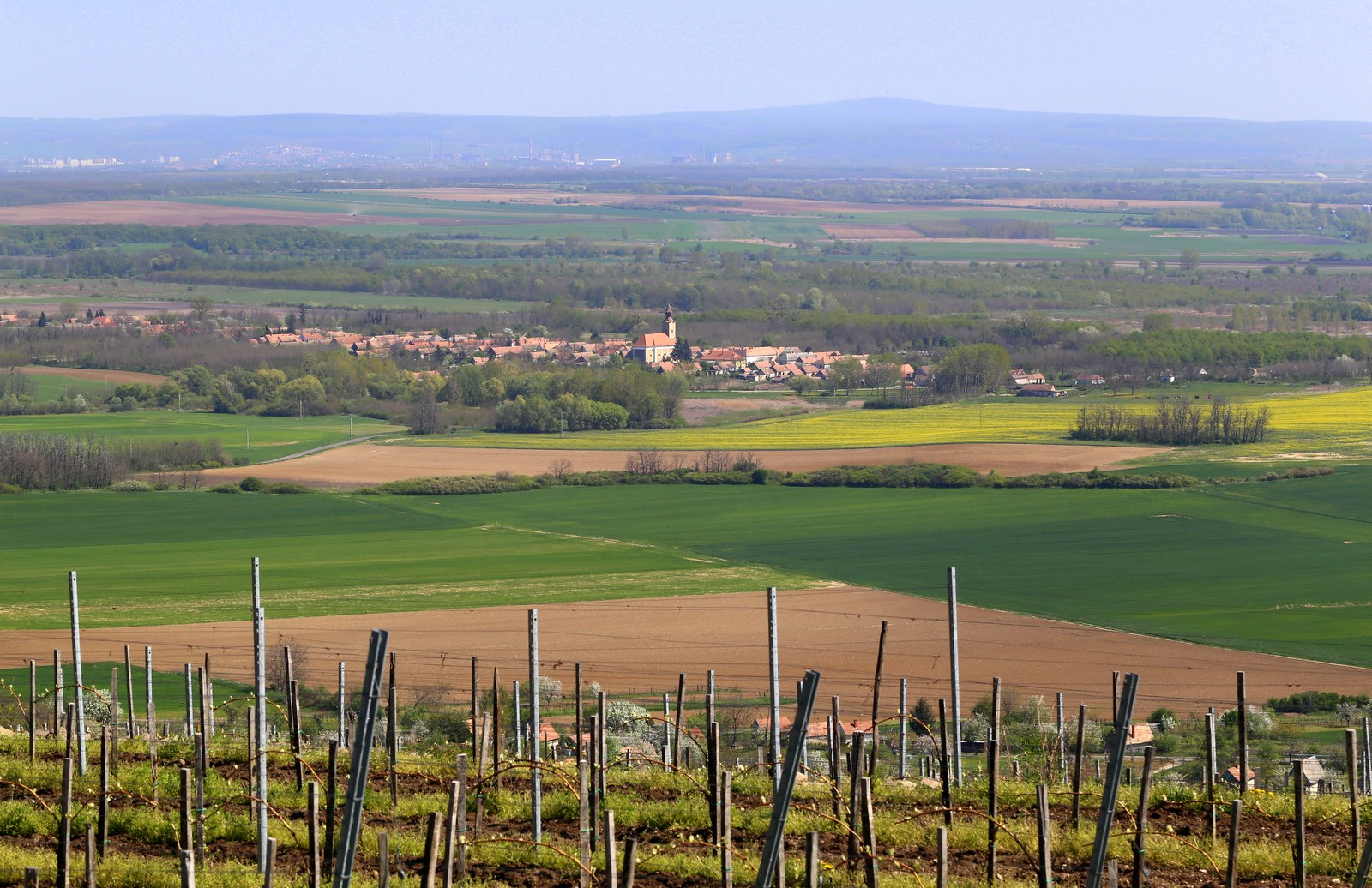 Borszörcsök település a Solmó-hegy felől